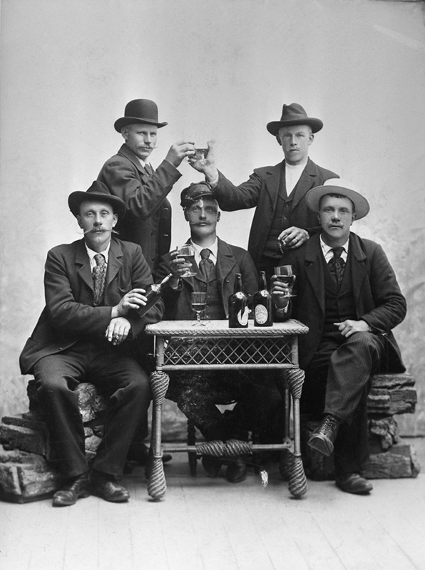 Gruppbild, ateljébild. Fem män skålar kring ett bord.